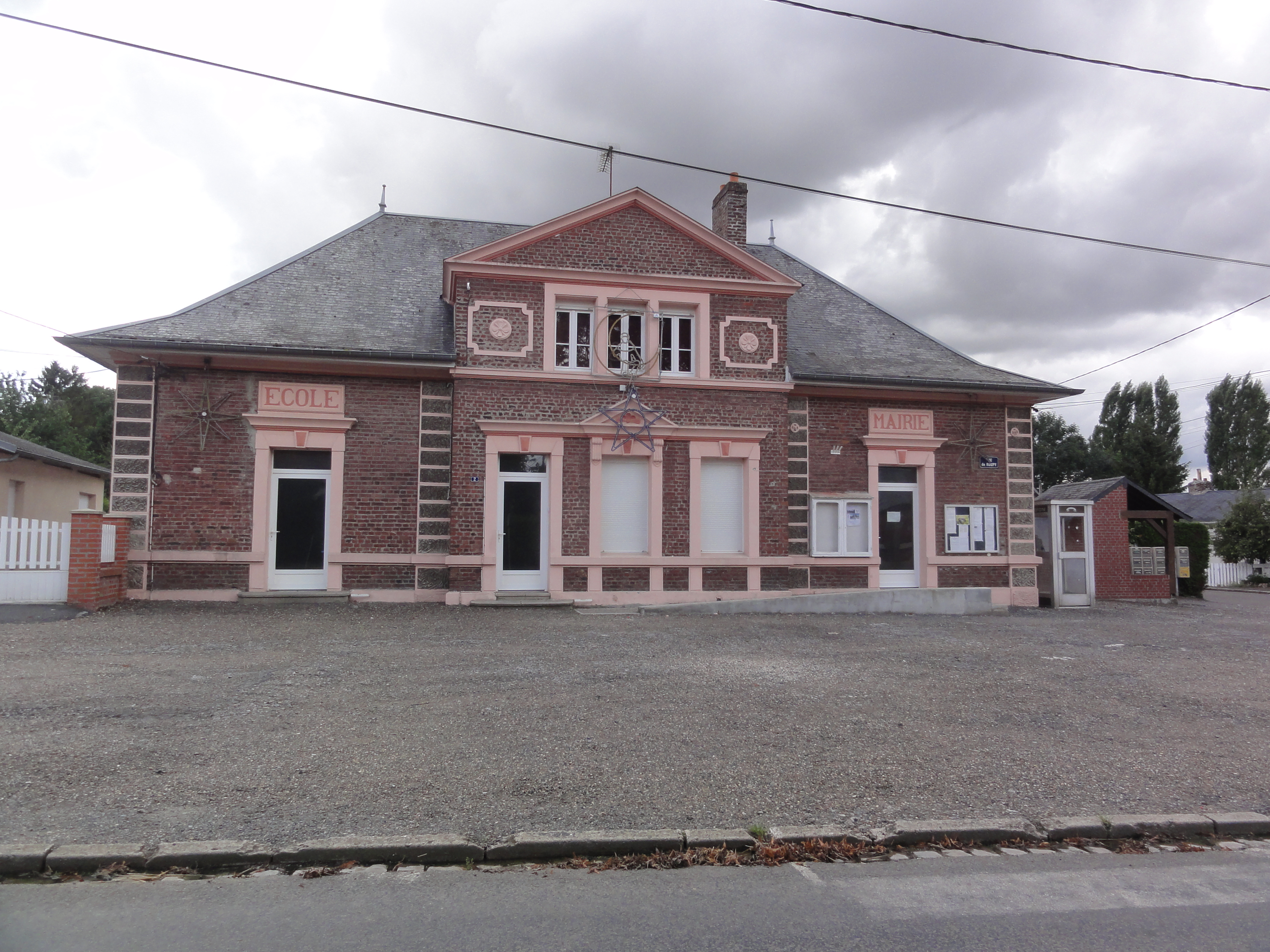 Vaux-en-Vermandois (Aisne) mairie-école